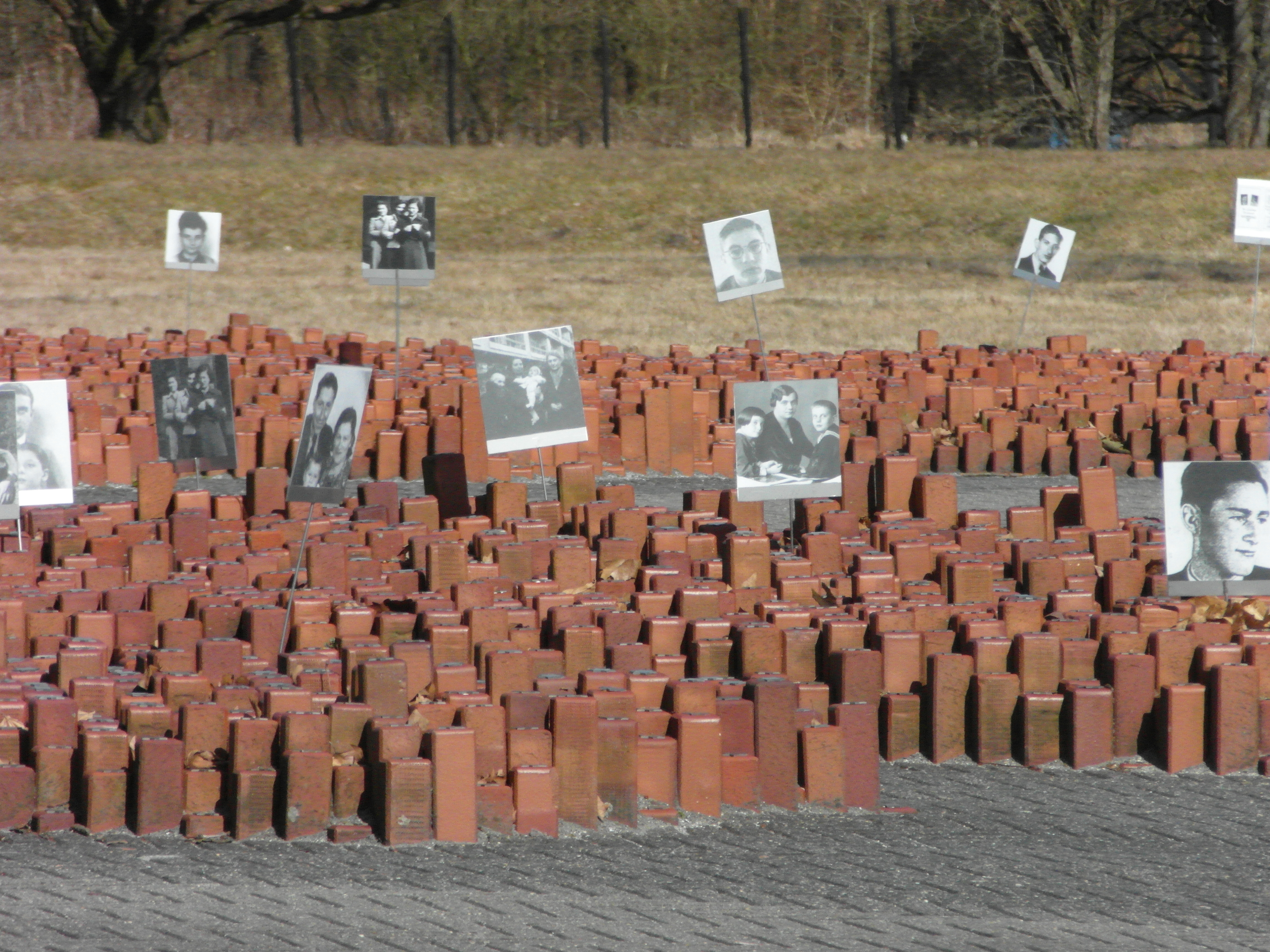 westerbork